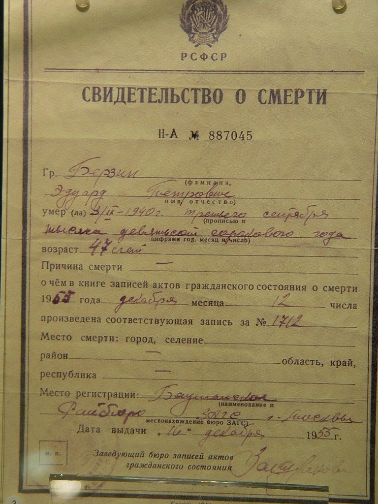 Свидетельство о смерти Берзина Эдуарда Петровича от 16 декабря 1955 г. Из экспозиции Магаданского областного краеведческого музея.